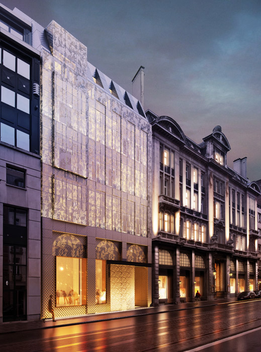 Projet de l'atelier Ma² - Metzger et Associés Architecture pour la rénovation et l'extension de l'Hôtel Astoria, à Bruxelles.